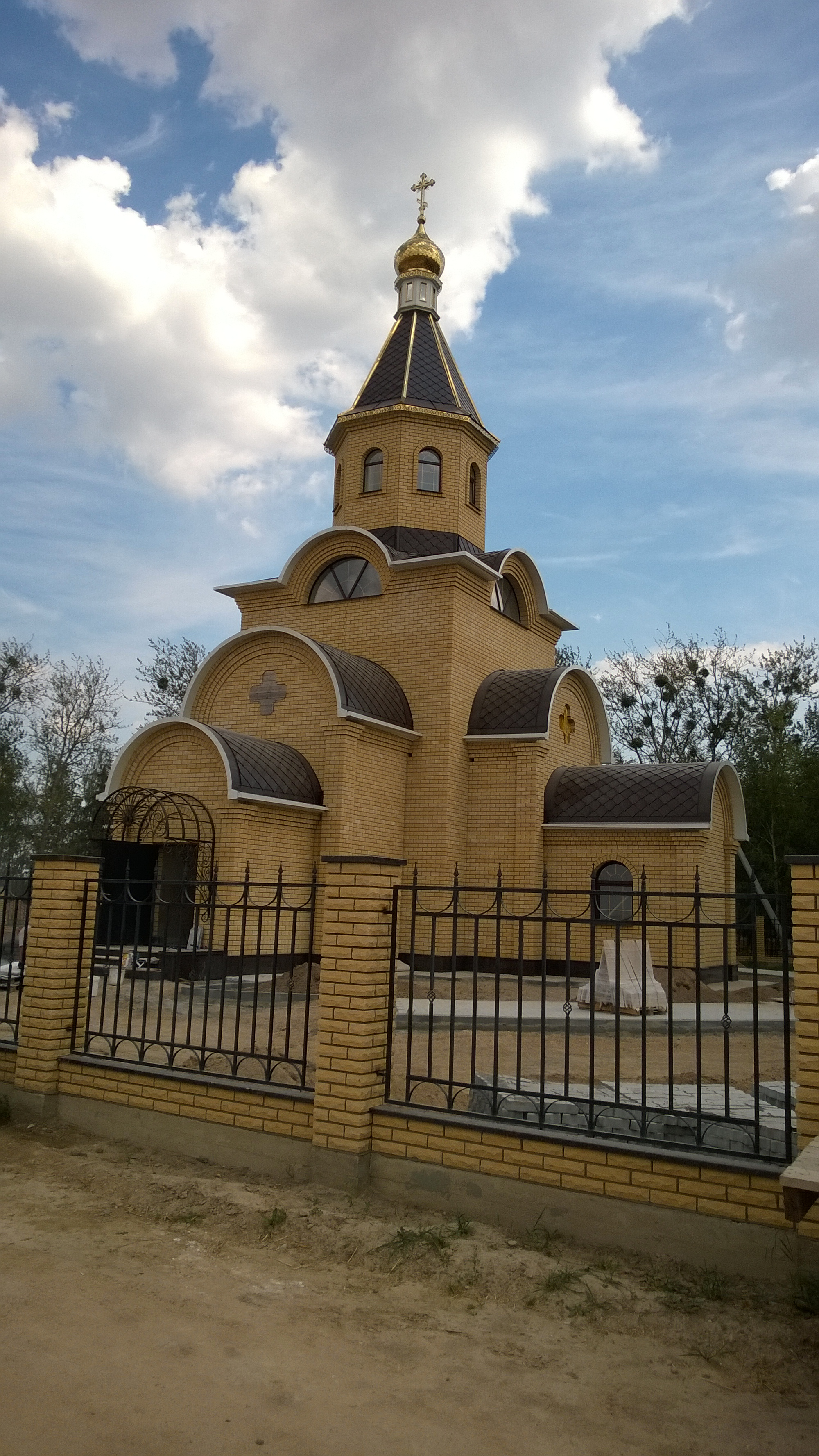 Grodna District, Belarus